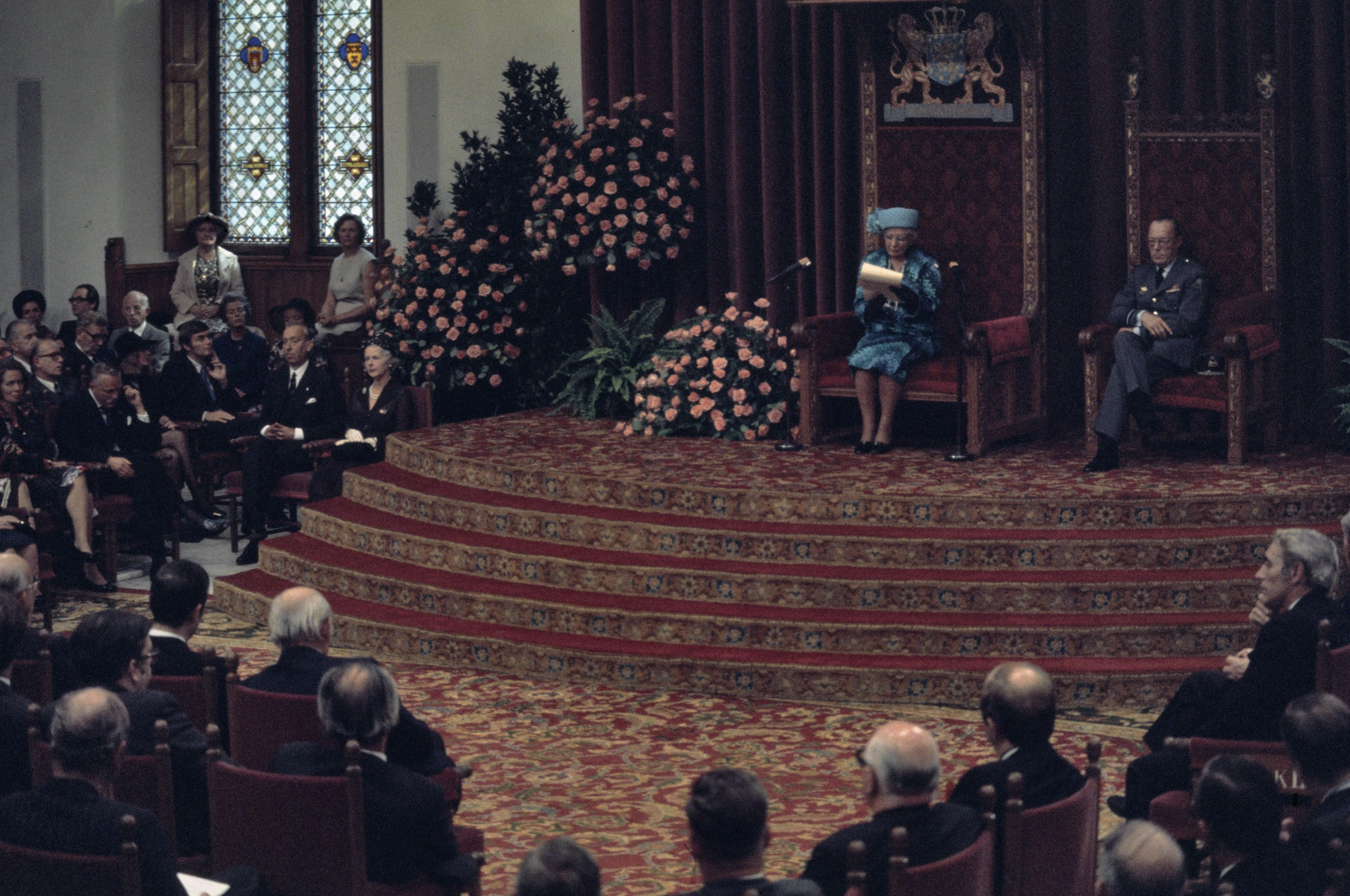 Collectie / Archief : Fotocollectie Anefo Reportage / Serie : Prinsjesdag 1974 Beschrijving : Koningin Juliana leest de troonrede voor, naast haar prins Bernhard Annotatie : Vanwege de gijzeling in de Franse ambassade in Den Haag is de koningin niet met de Gouden koets maar in een auto naar de Ridderzaal gegaan. Prinsjesdag is versoberd Datum : 17 september 1974 Locatie : Den Haag, Zuid-Holland Trefwoorden : troonredes Persoonsnaam : Bernhard (prins Nederland), Juliana (koningin Nederland) Fotograaf : Mieremet, Rob / Anefo Auteursrechthebbende : Nationaal Archief Materiaalsoort : Dia (kleur) Nummer archiefinventaris : bekijk toegang 2.24.01.06 Bestanddeelnummer : 254-9599